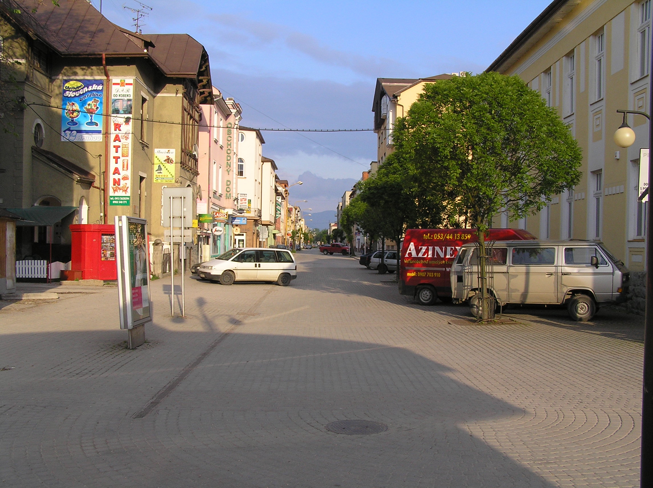 Štefánikova ulica Námestie Andreja Hlinku, Žilina